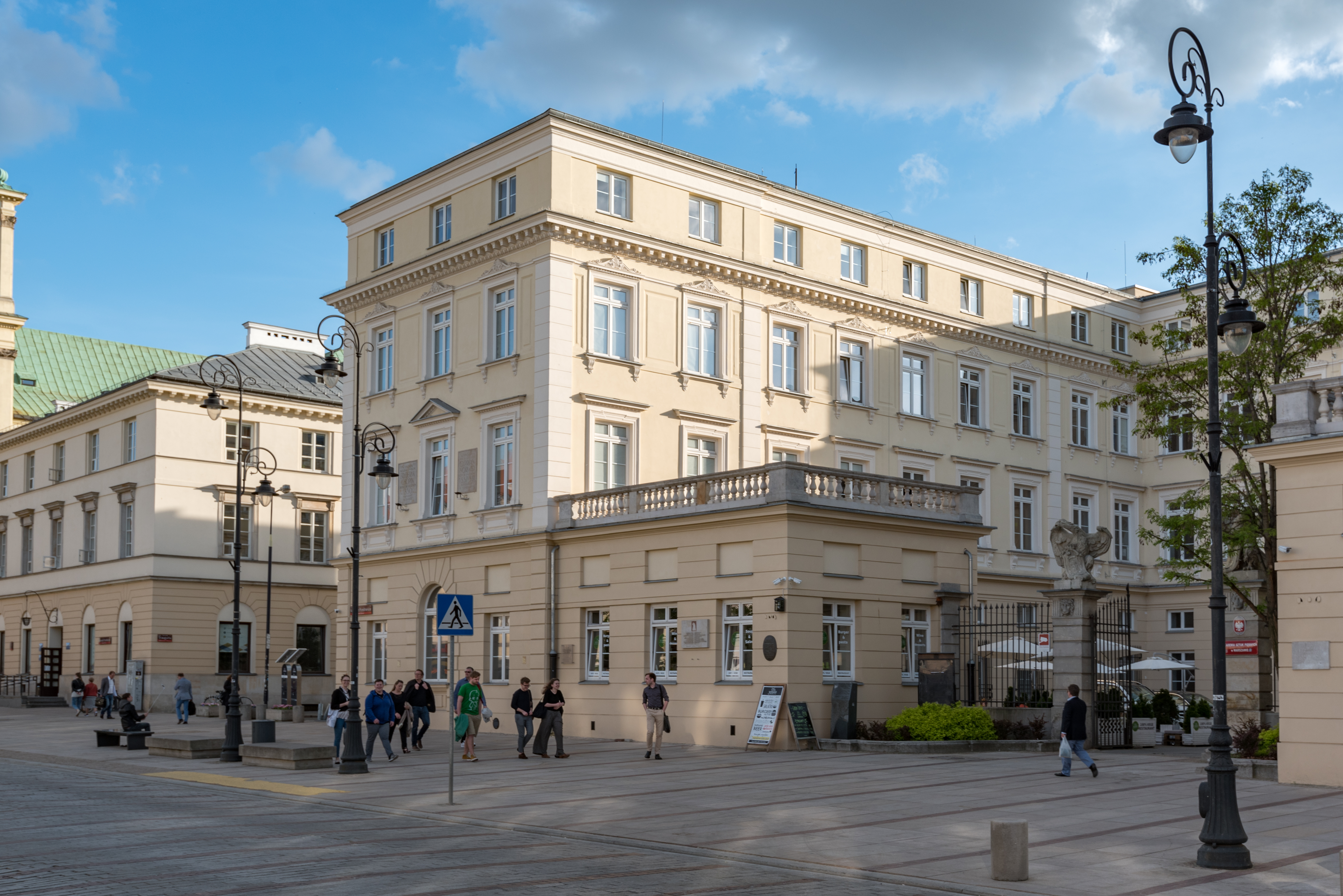 Warszawa, ul. Krakowskie Przedmieście 5